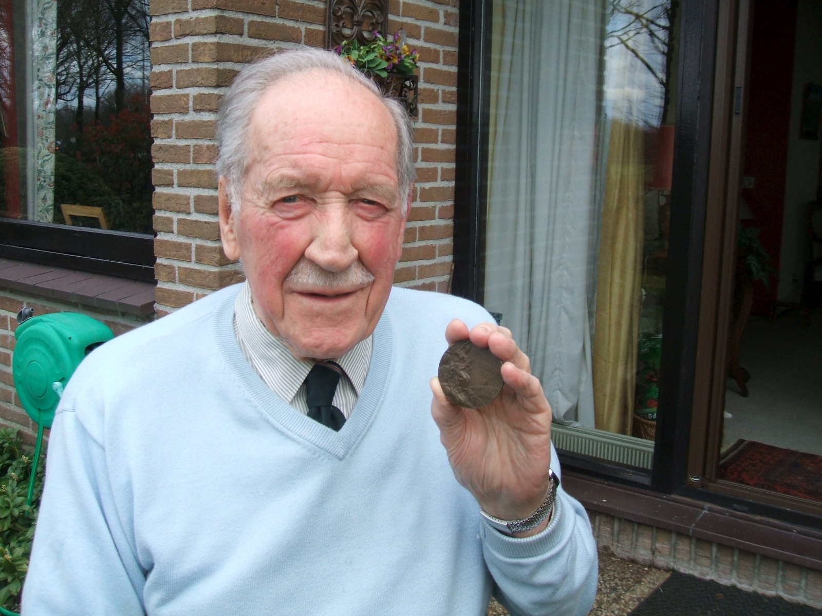 Hans Schnitger met de bronzen medaille uit 1936.